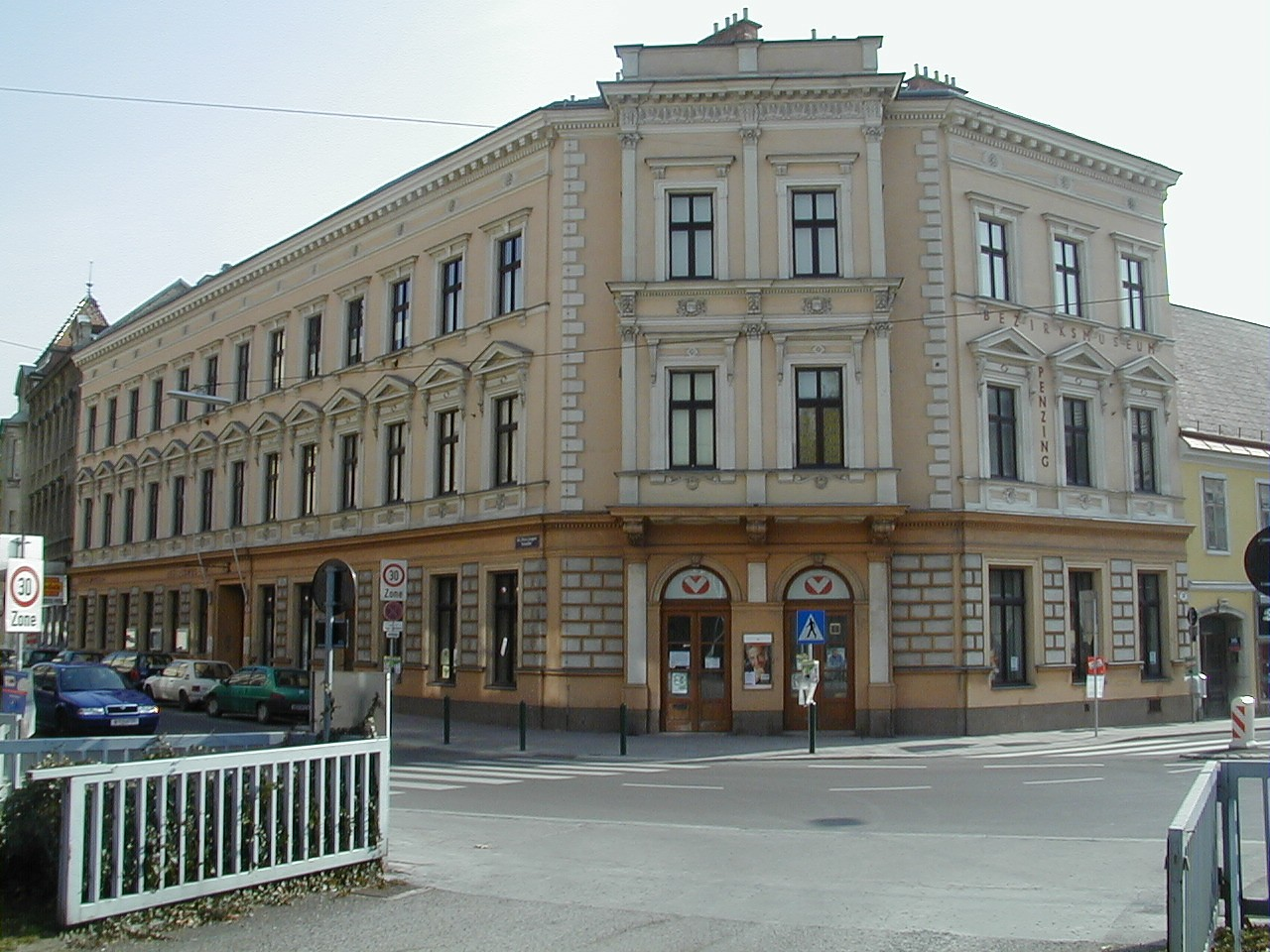 Bezirksmuseum Penzing (ehemaliges Amtshaus)